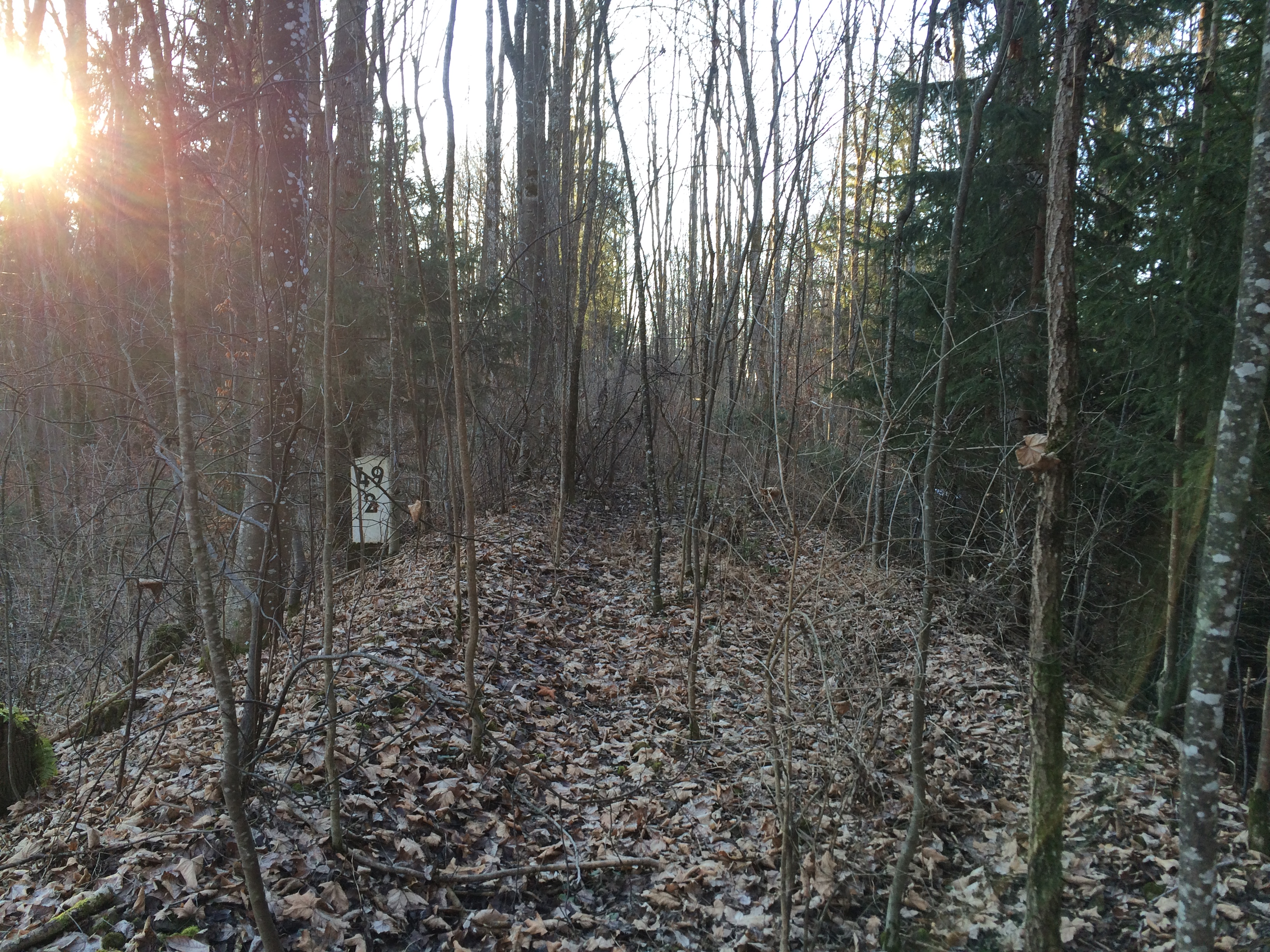 Aufnahme der Bahntrasse der ehemaligen Isartalbahn mit Blickrichtung Westen kurz vor Bichl (2015)